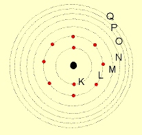 Níveis eletrônicos de energia propostos por Niels Bohr